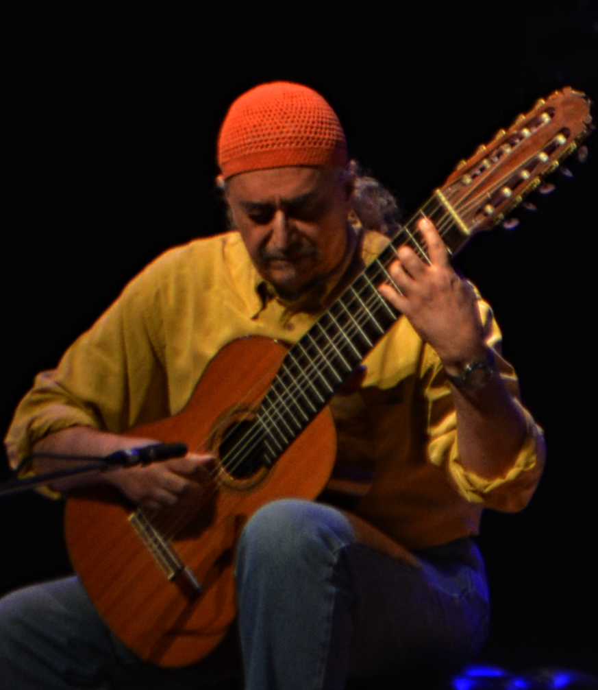 Egberto Gismonti. Sala Sinfónica Centro Cultural Néstor Kirchner, Buenos Aires, Argentina.